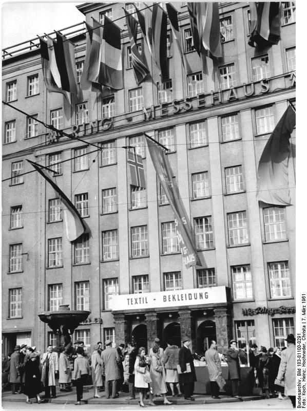 Leipzig, Ringmessehaus Zentralbild Koch-Hochneder Nl-Pz 7.3.1961 Messe-Sonderdienst-Leipziger Frühjahrsmesse 1961 UBz: Blick auf das Ring-Messehaus.